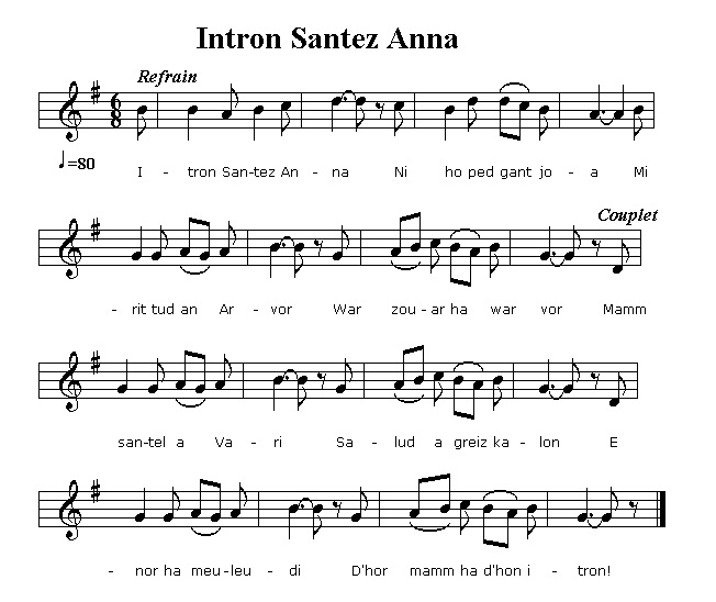 Cantique